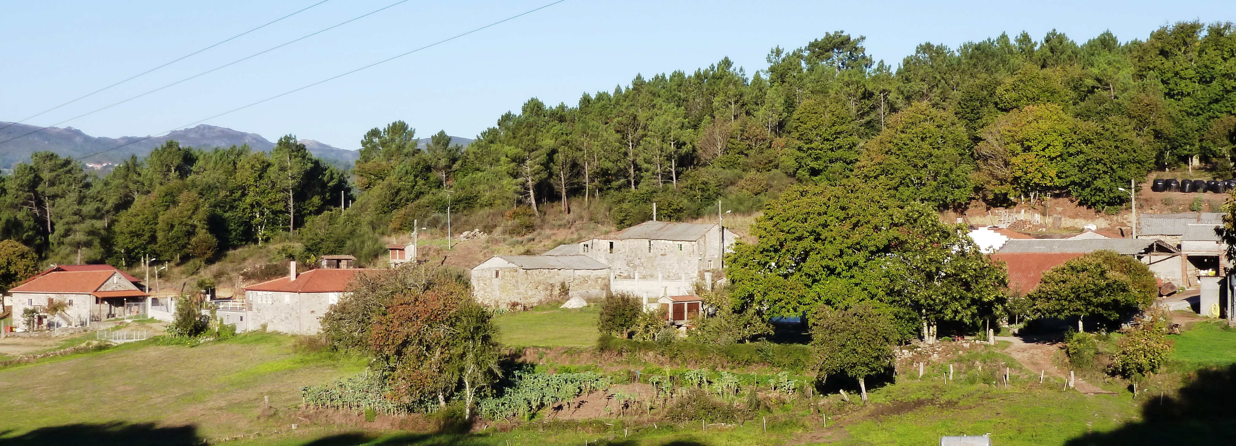 Trasmontes, Buciños, Carballedo